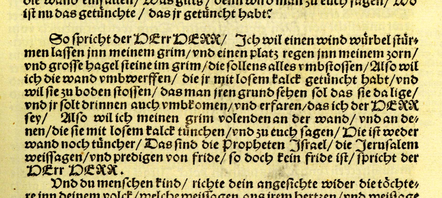 Windwirbel Platzregen Hagelsteine (Schreibweise 1534)